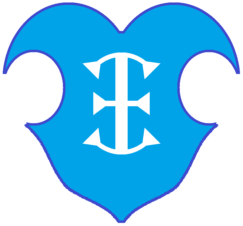 Герб Івана Тимофійовича Проскури